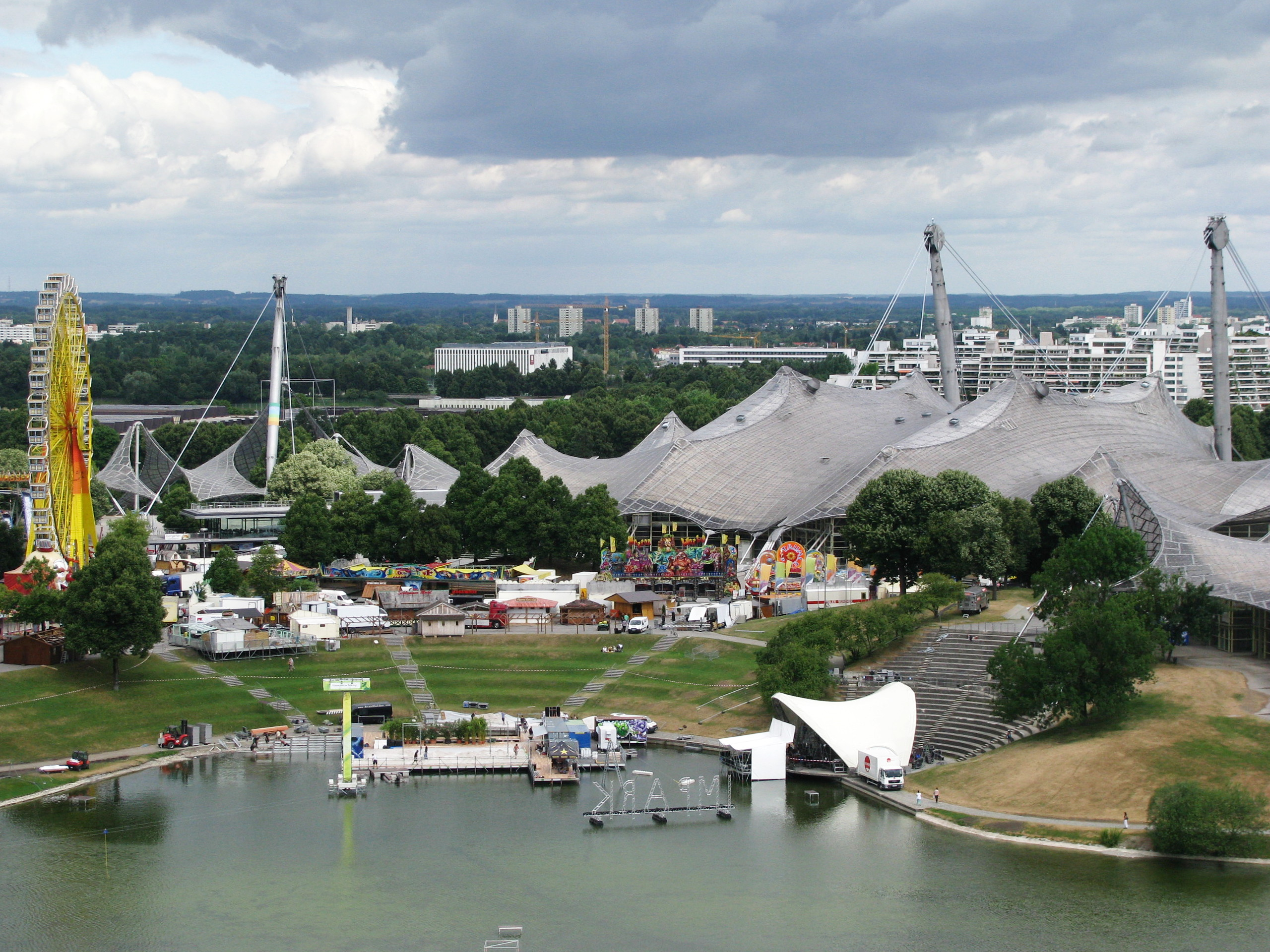 Sommerfestival „IMPARK“ im Münchner Olympiapark